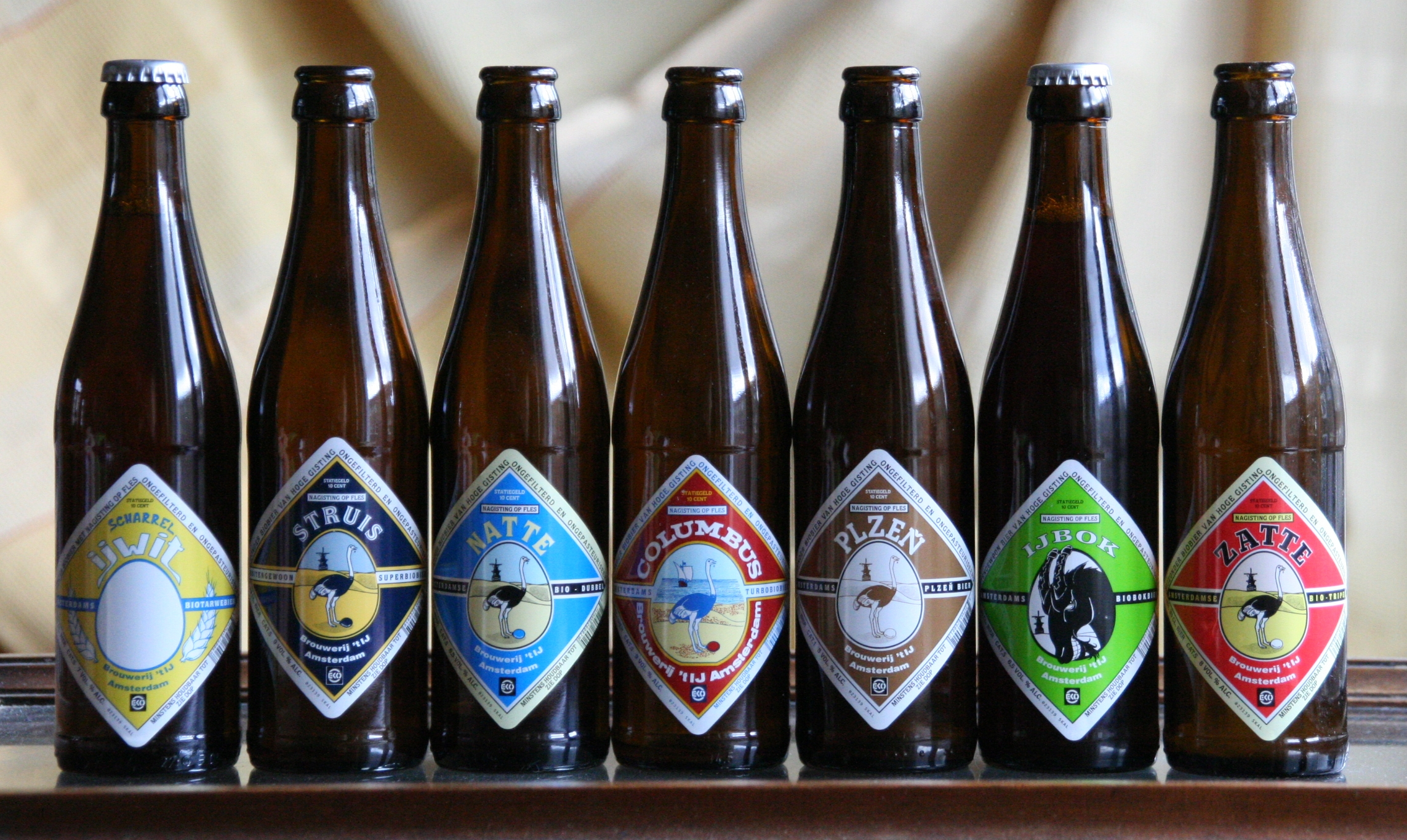 La game des bières de la Brasserie IJ